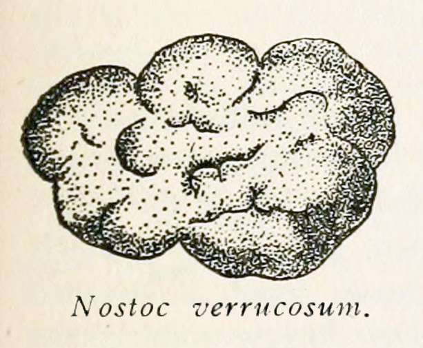 Nostoc verrucosum (extrait d'un ouvrage ancien sur les plantes-poisons (A manual of poisonous plants ; publié en 1910-1911) par L. H. Pammel (Page 185, Fig. 31) (; 10.5962/bhl.title.10913 lien), déjà téléchargé dans Commons (ici)